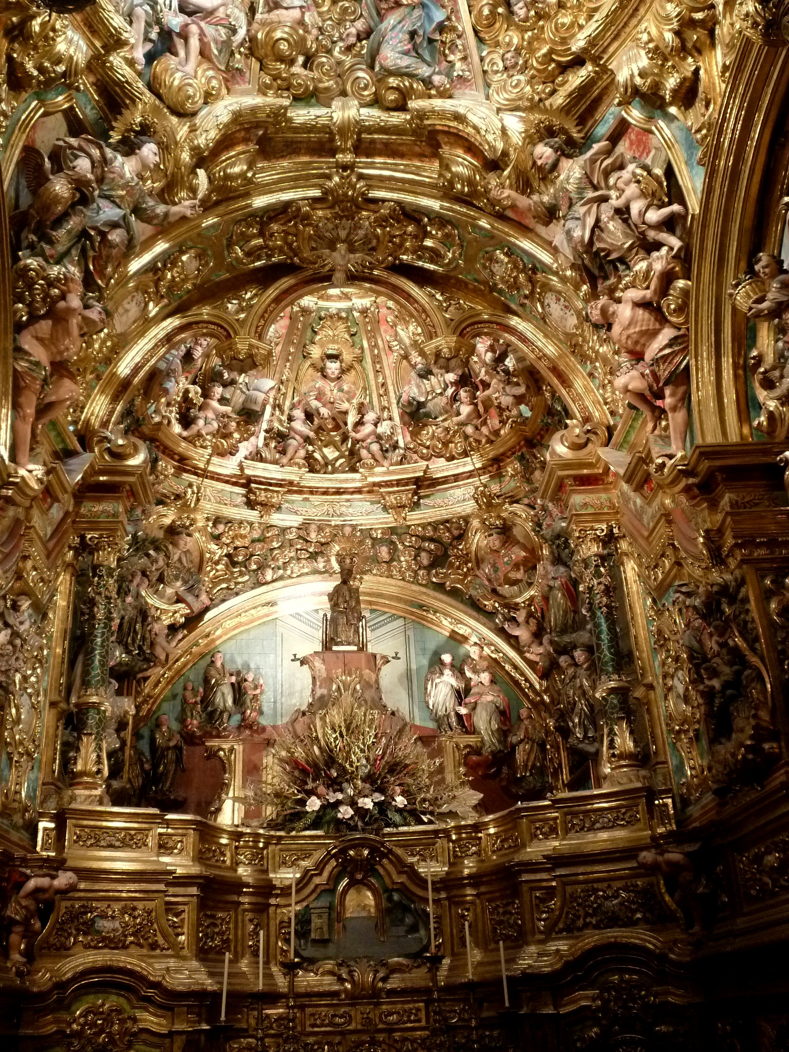 Església de Sant Llorenç de Morunys: retaule de la Mare de Déu dels Colls